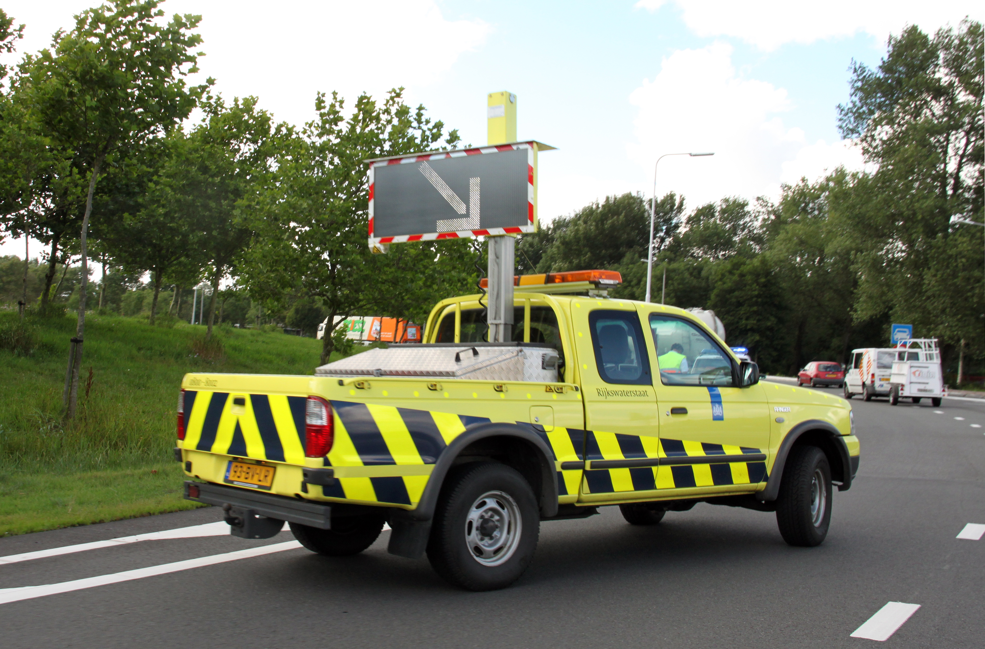 Een weginspecteur van Rijkswaterstaat zet een deel van de rotonde bij Joure af na een ongeval.